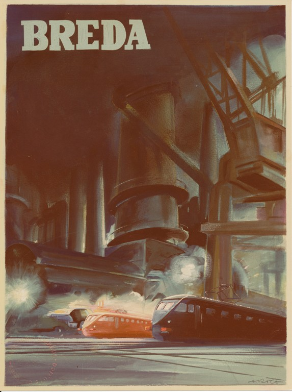 Manifesto pubblicitario della Breda, società italiana per costruzioni meccaniche di Ernesto Breda (Fondazione Istituto per la storia dell'età contemporanea - Onlus, Breda)